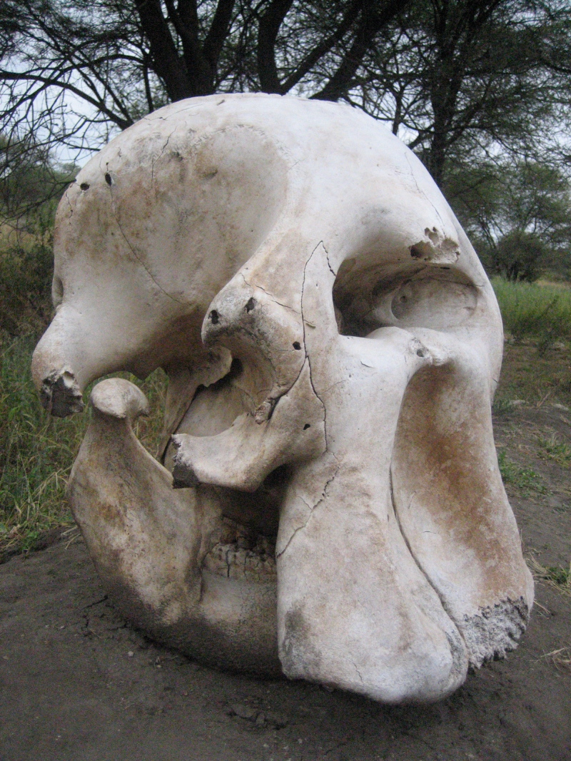 elephant skull